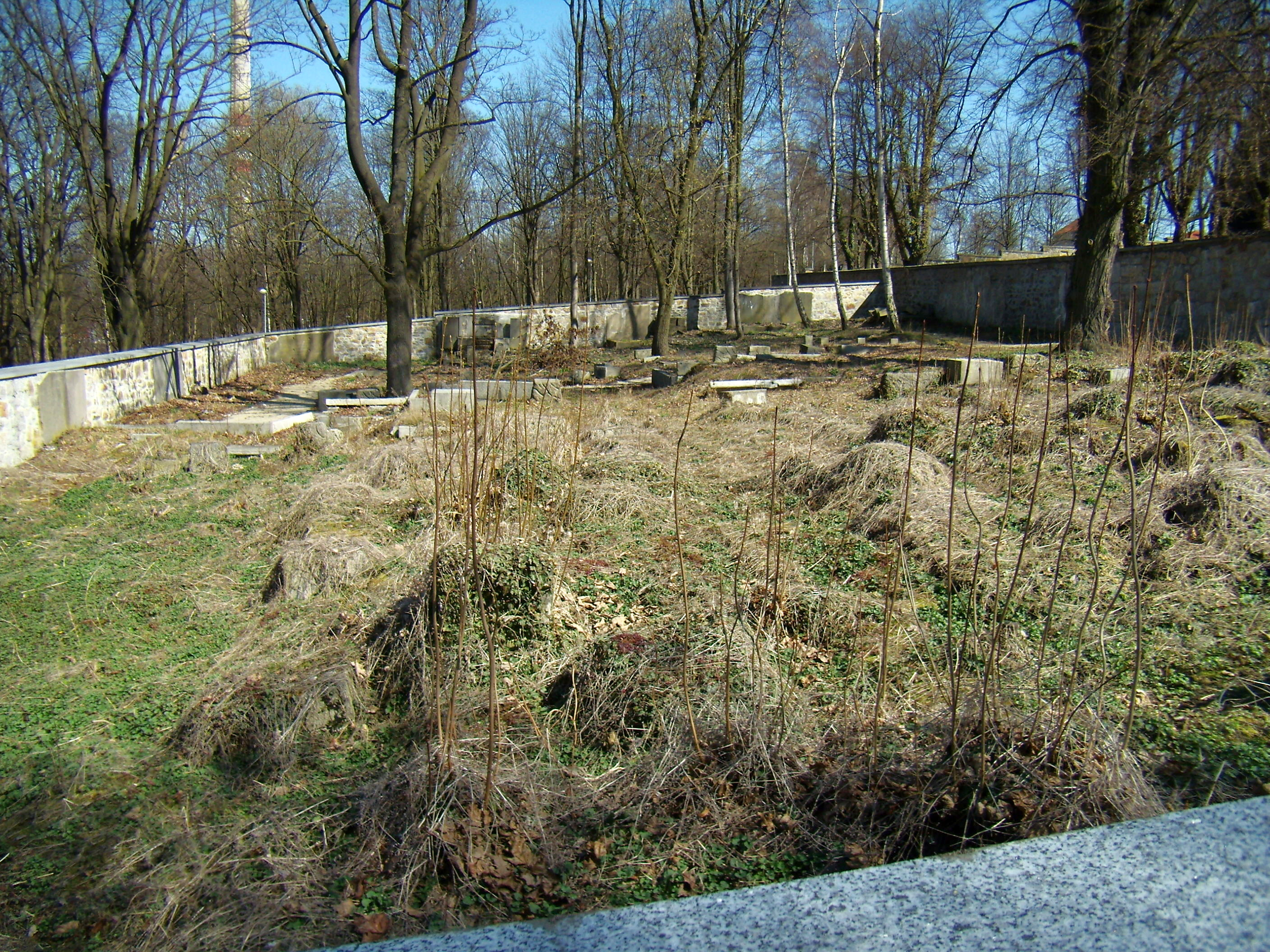 Židovský hřbitov Sokolov